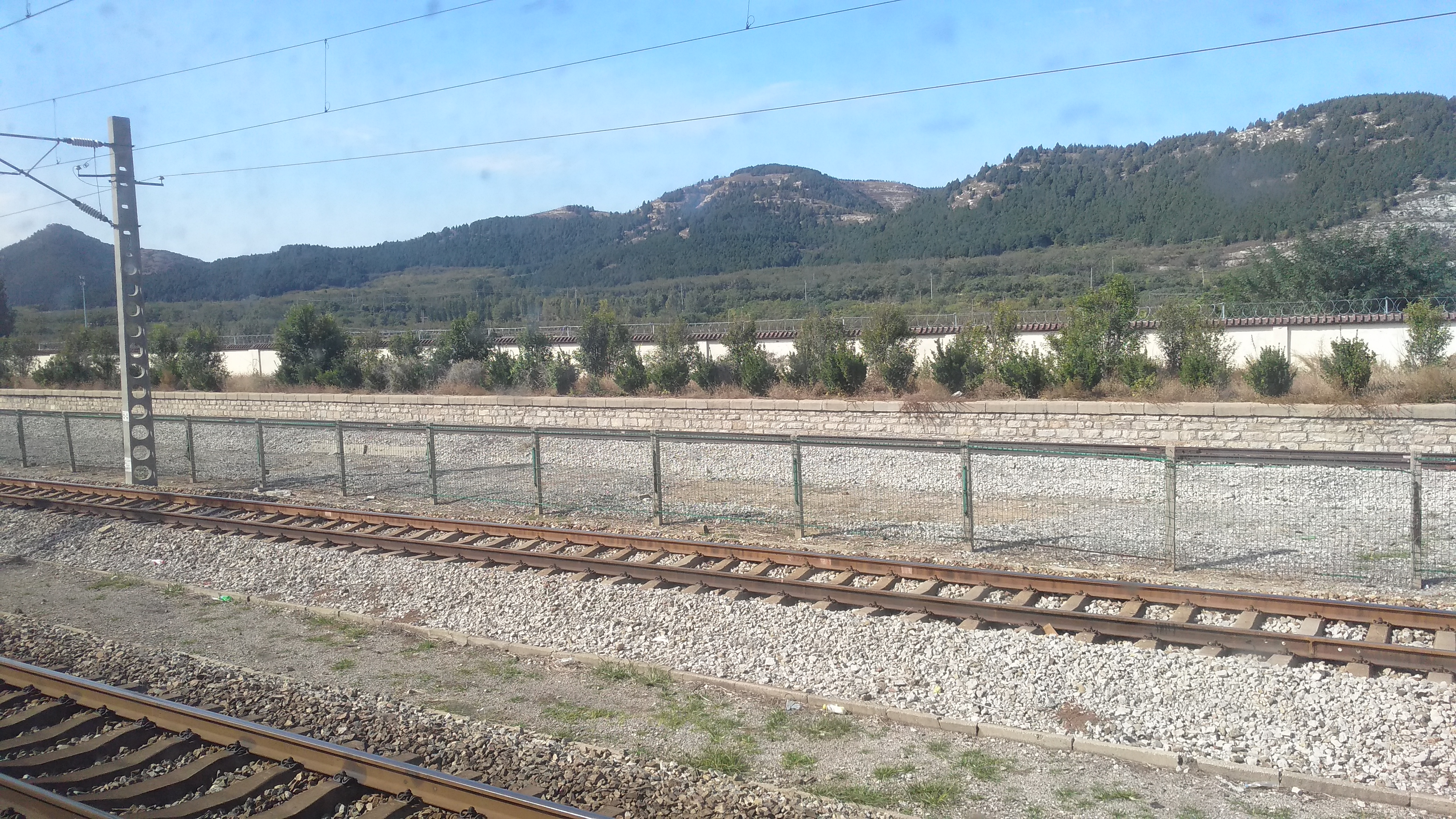 炒米店火车站。